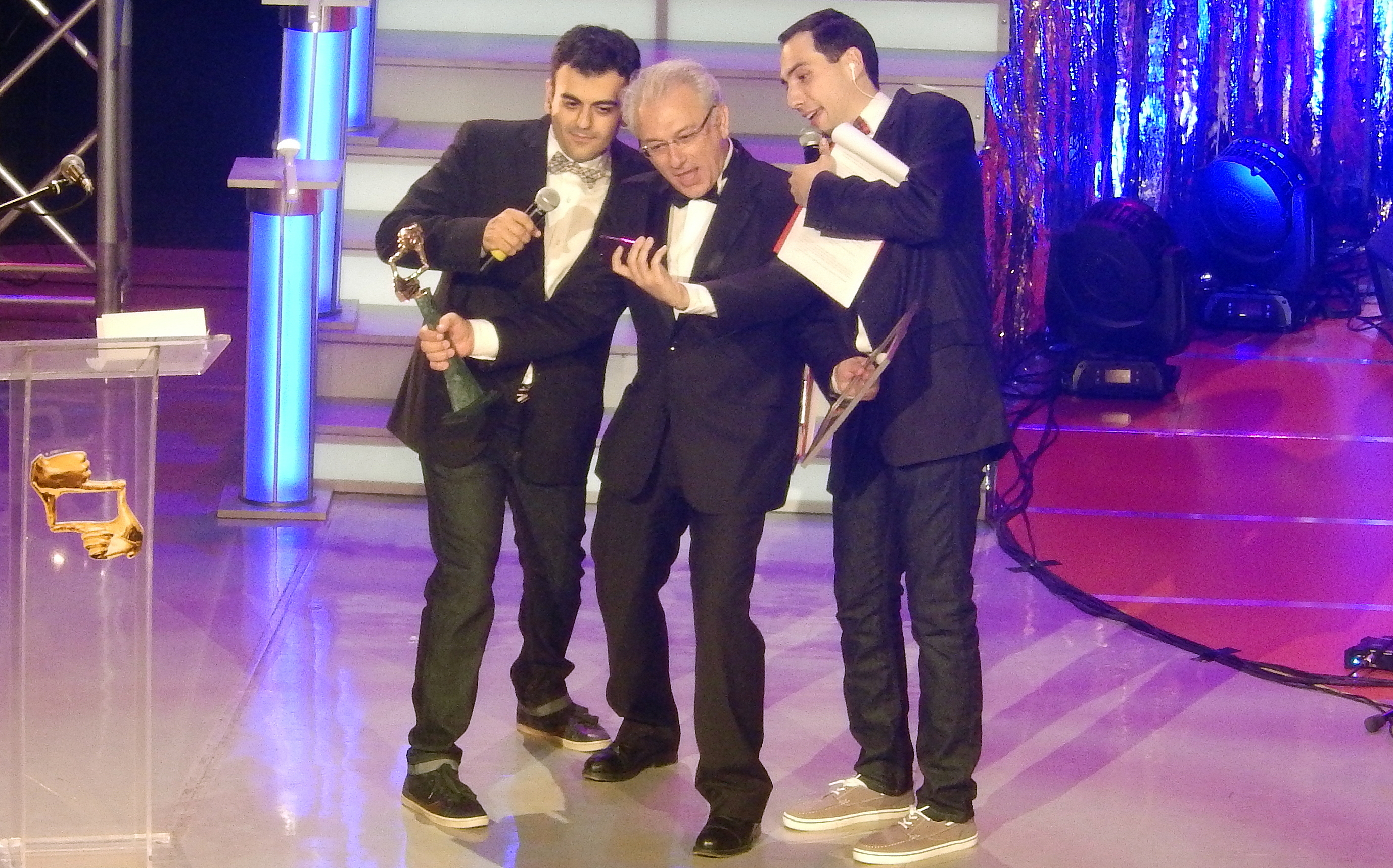 ArmComedy (ԱրմՔոմեդի) հաղորդավարներ Սերգեյ Սարգսյանը և Նարեկ Մարգարյանը «Հայակ 2014» մրցանակաբաշխությանը